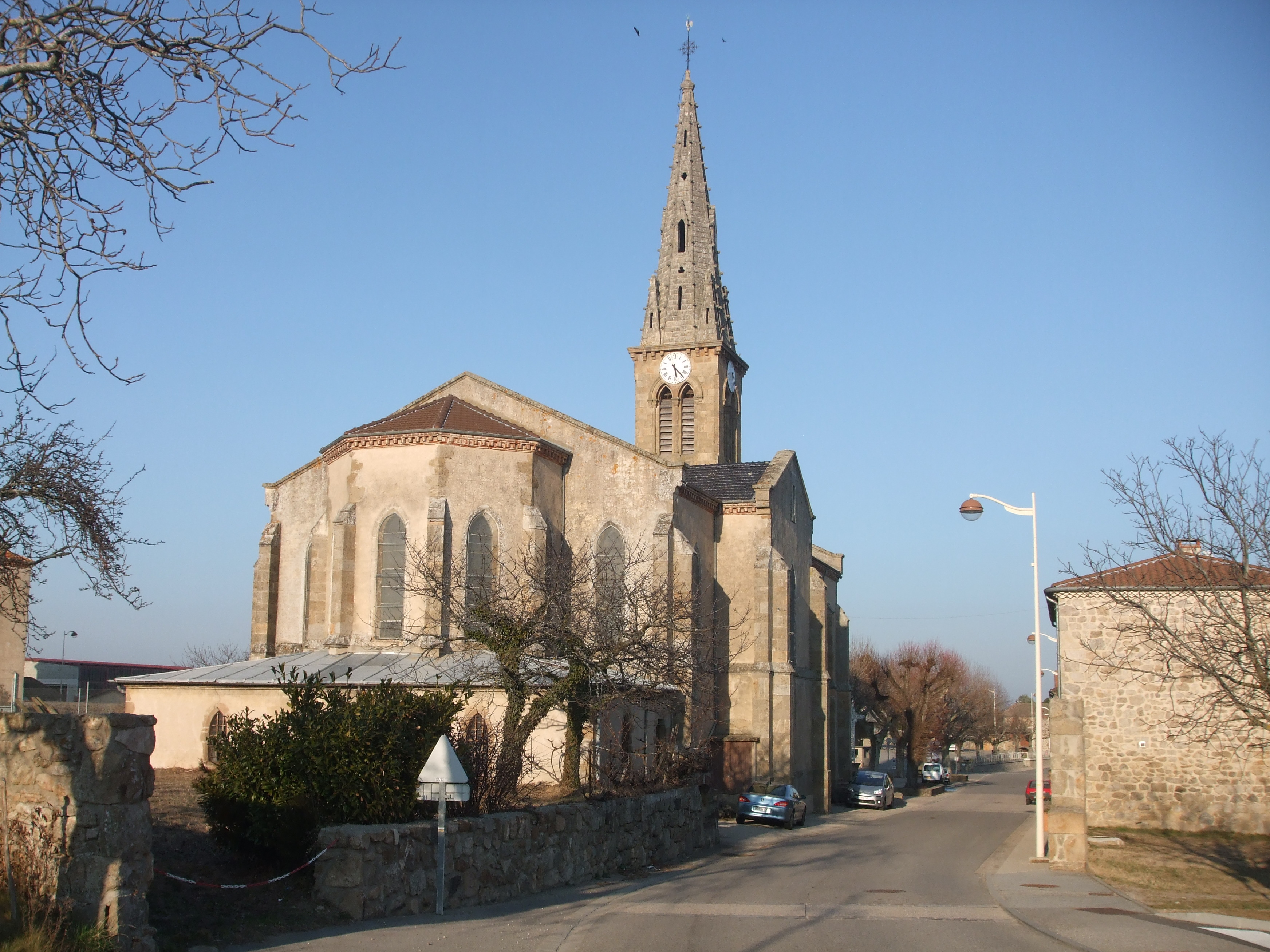 Église Saint Martin